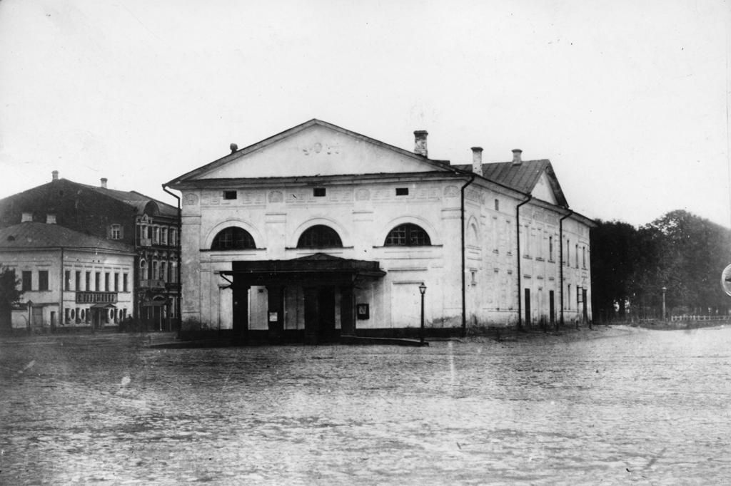 Здание театра в Ярославле, построенное по проекту архитектора П. Я. Панькова на средства Санкт-Петербургского купца М. Я. Алексеева.